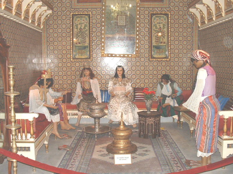 Photographie personnelle prise au musée Dar Cheraït à Tozeur (Tunisie), représentant une scène de la cérémonie traditionnelle du mariage